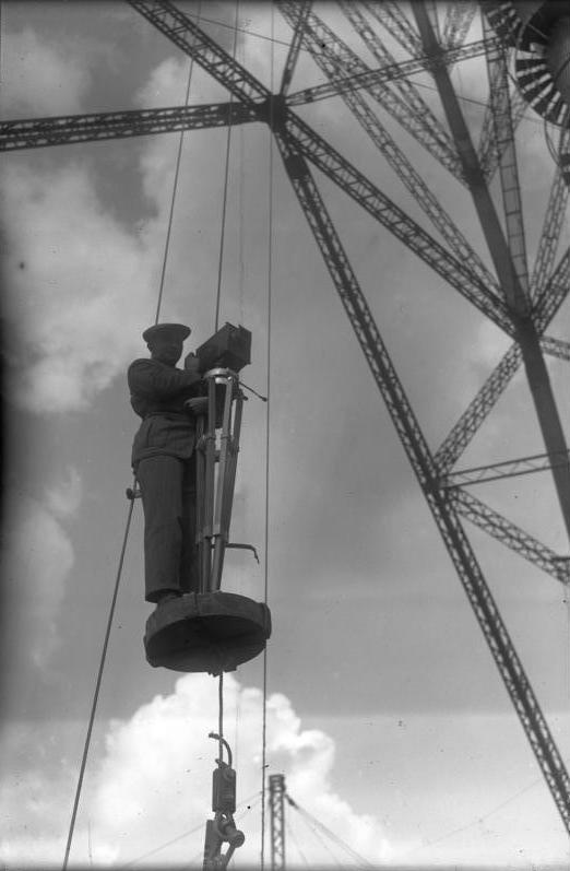 Gefährlicher Beruf! Der Kino-Operateur kurbelt in luftiger Lage die Arbeiten der Ingenieure bei der Prüfung der Eisenconstruktionen des Deutschlandsenders.